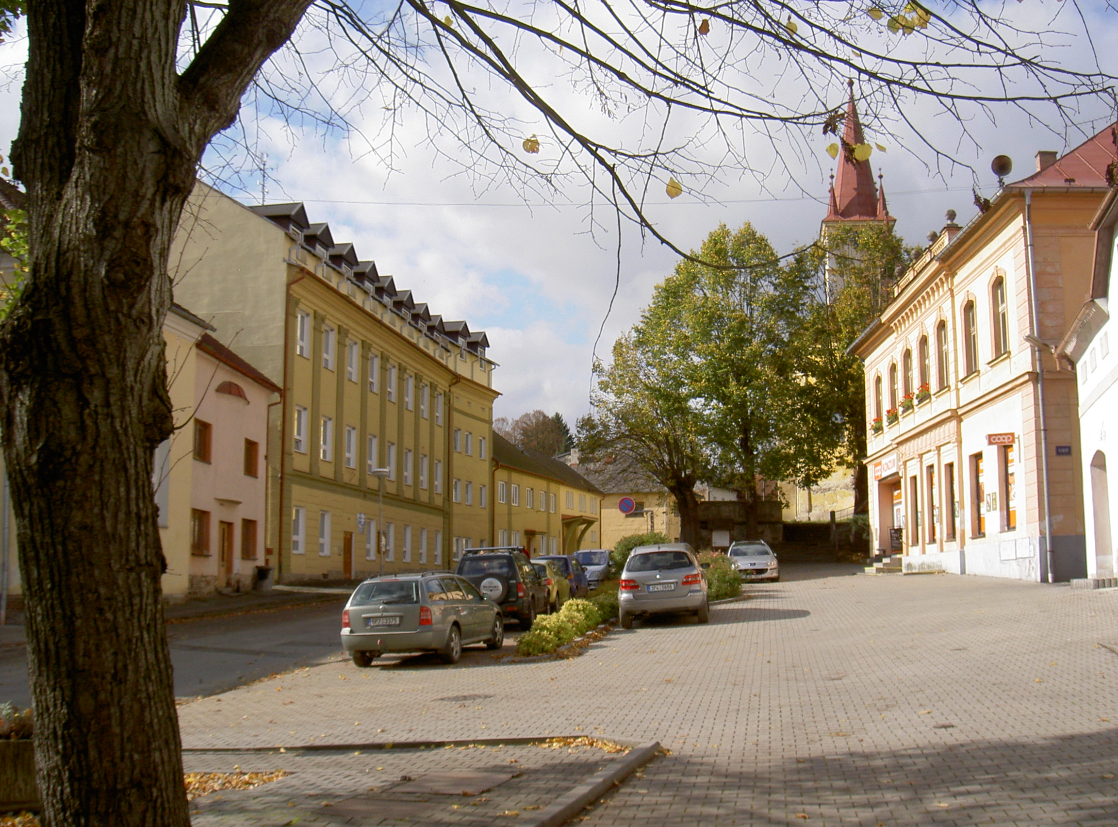 Hostau